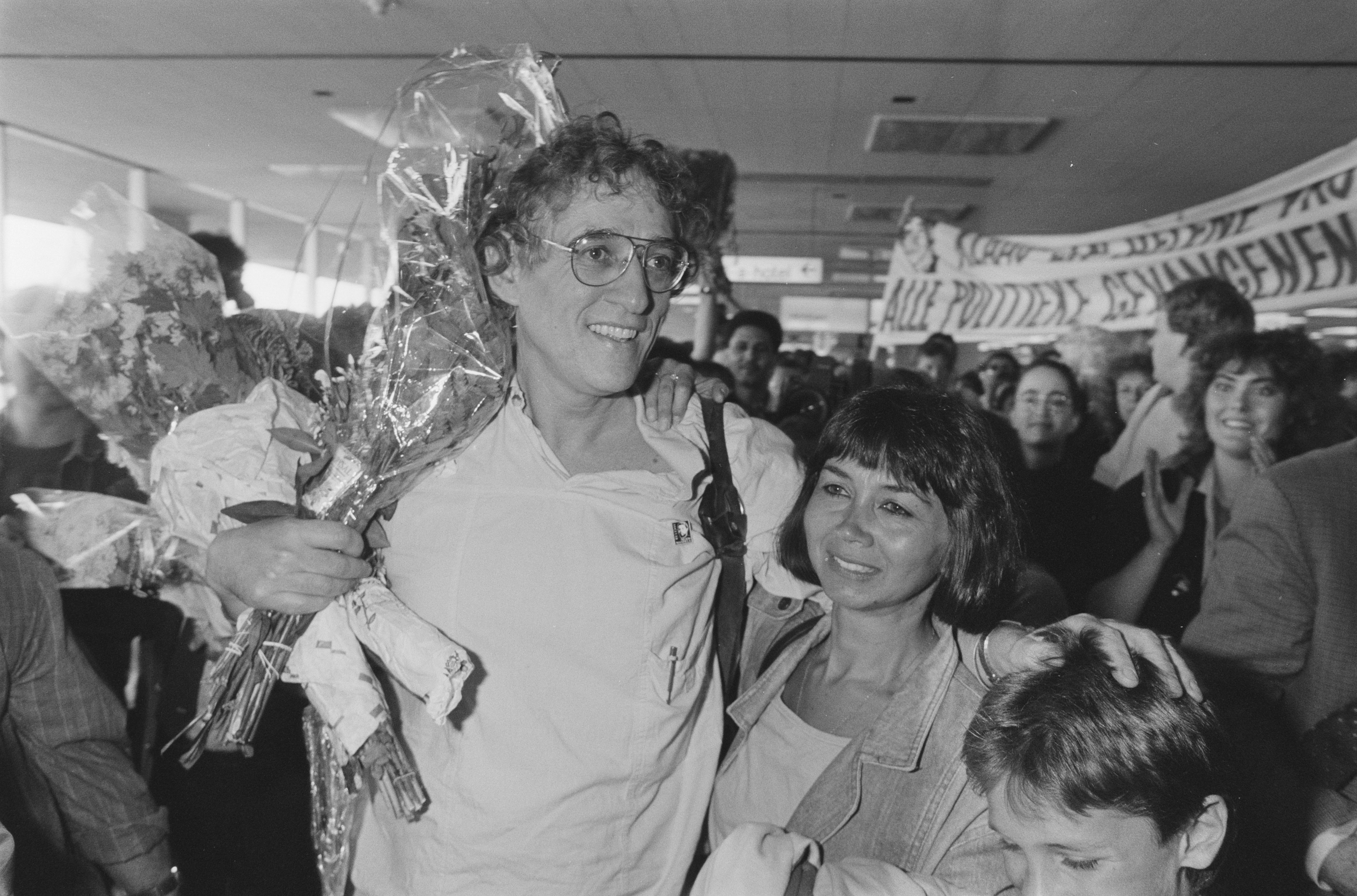 Collectie / Archief : Fotocollectie Anefo Reportage / Serie : [ onbekend ] Beschrijving : Klaas de Jonge na 2 jaar Zuidafrikaanse gevangenschap terug op Schiphol; Klaas de Jonge verwelkomd door vriend en sympathisanten Datum : 8 september 1987 Trefwoorden : GEVANGENSCHAPPEN, vrijlatingen Persoonsnaam : Klaas De Jonge Instellingsnaam : Schiphol Fotograaf : Croes, Rob C. / Anefo Auteursrechthebbende : Nationaal Archief Materiaalsoort : Negatief (zwart/wit) Nummer archiefinventaris : bekijk toegang 2.24.01.05 Bestanddeelnummer : 934-0702